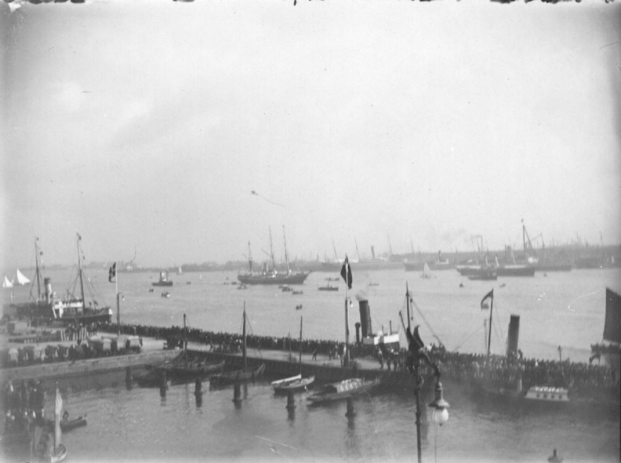 Cook a bordo dell'Hans Egede sta entrando nel porto di Copenaghen